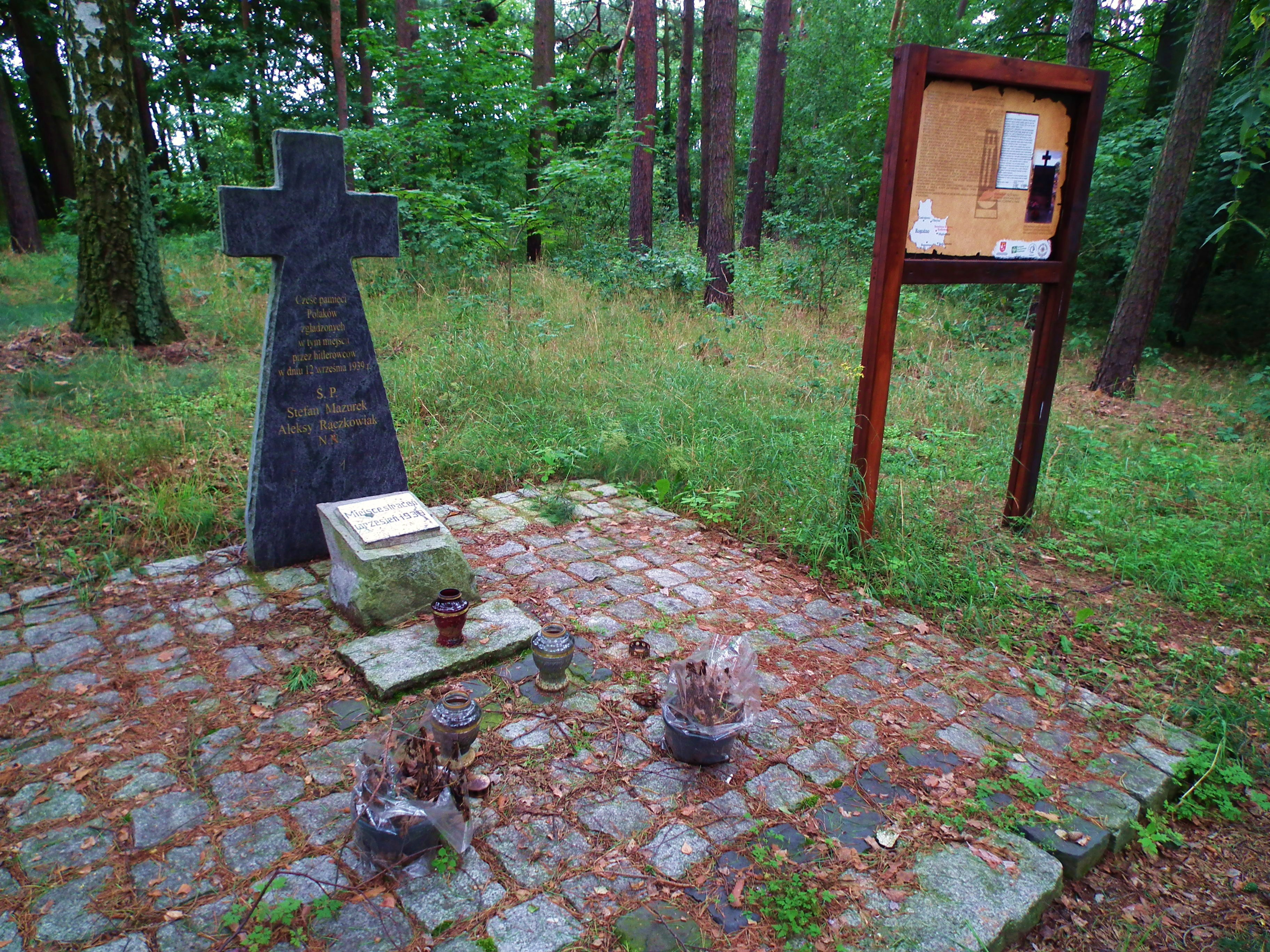 Miejsce pamięci narodowej nad jez. Rogozińskim. Upamiętnia zamorodowanych we wrześniu 1939 przez Selbschutz, Polaków.